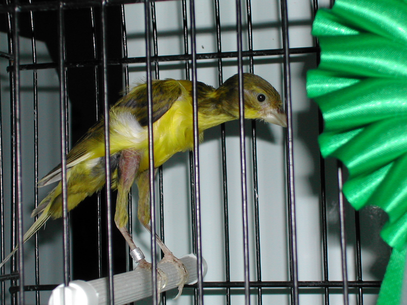 Canarino di forma e posizione